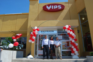 vips cardenas